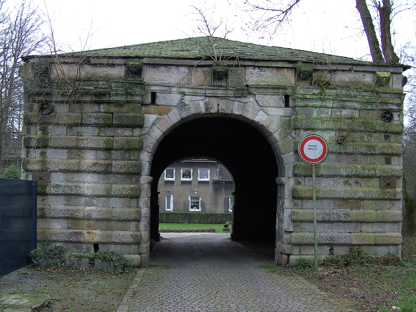 Torhaus des ehemaligen Hauses Achternberg